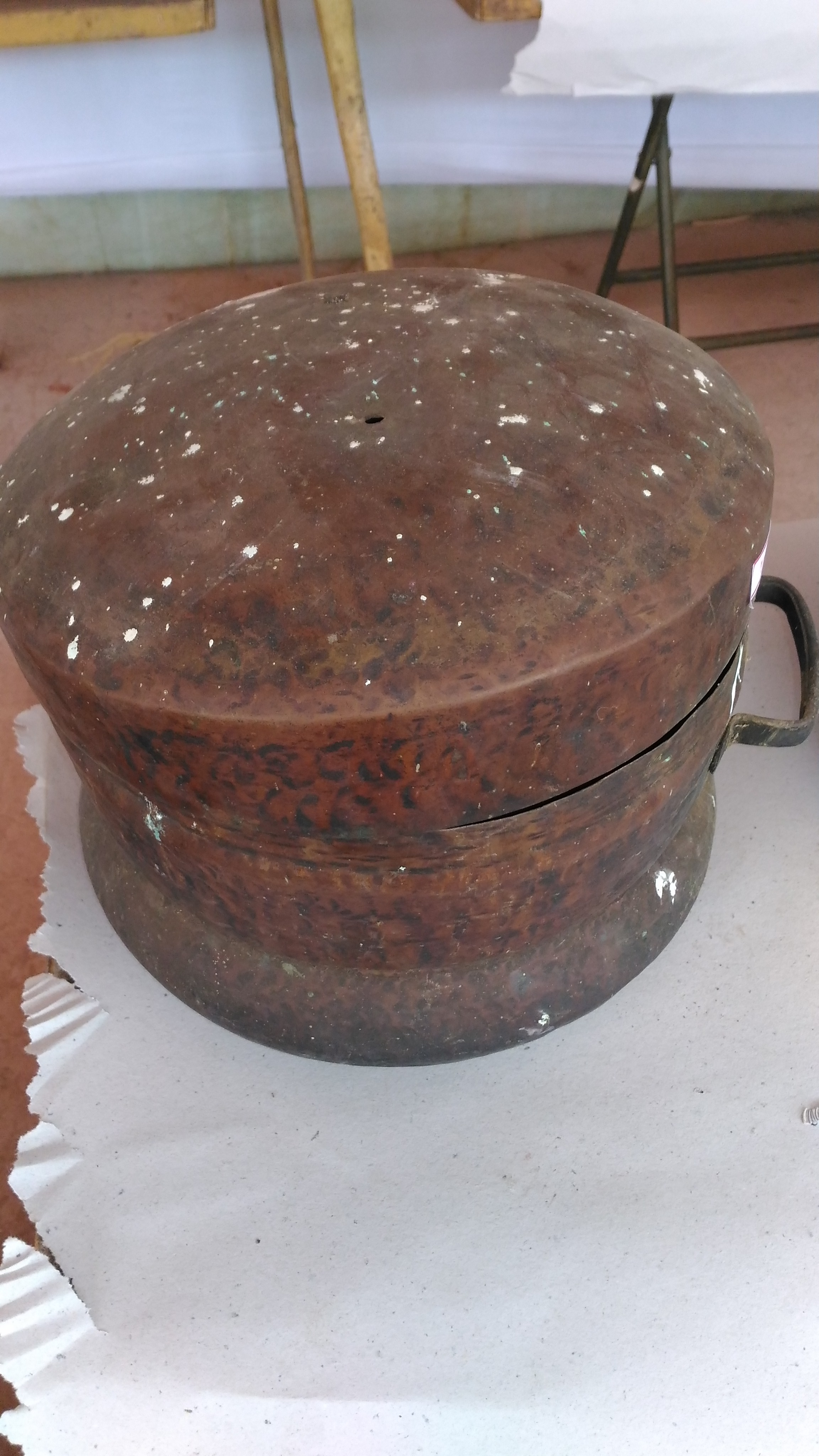 ചെമ്പ് കൊണ്ടുള്ള അപ്പച്ചെമ്പ്